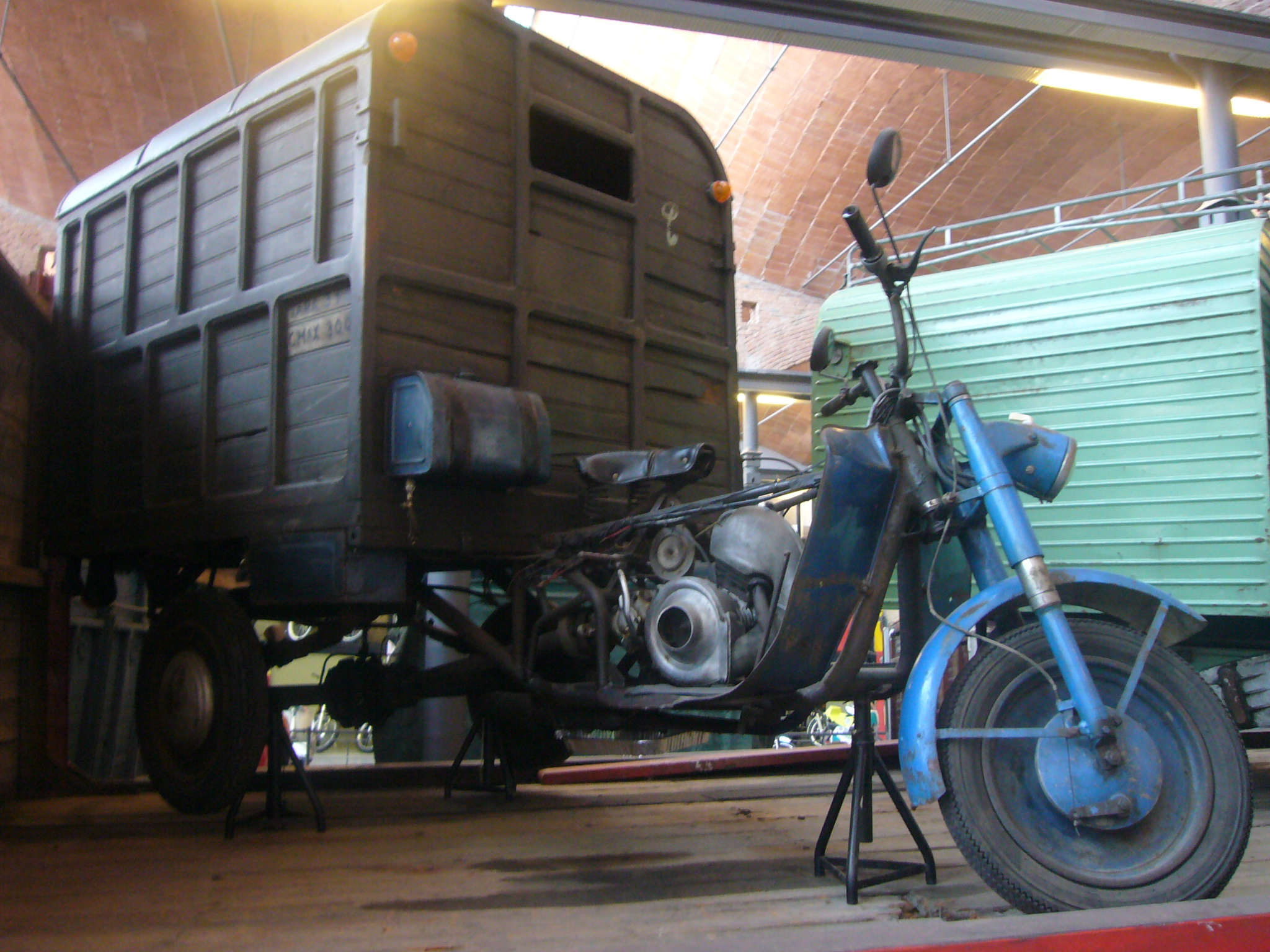 Isocarro model ISO 123